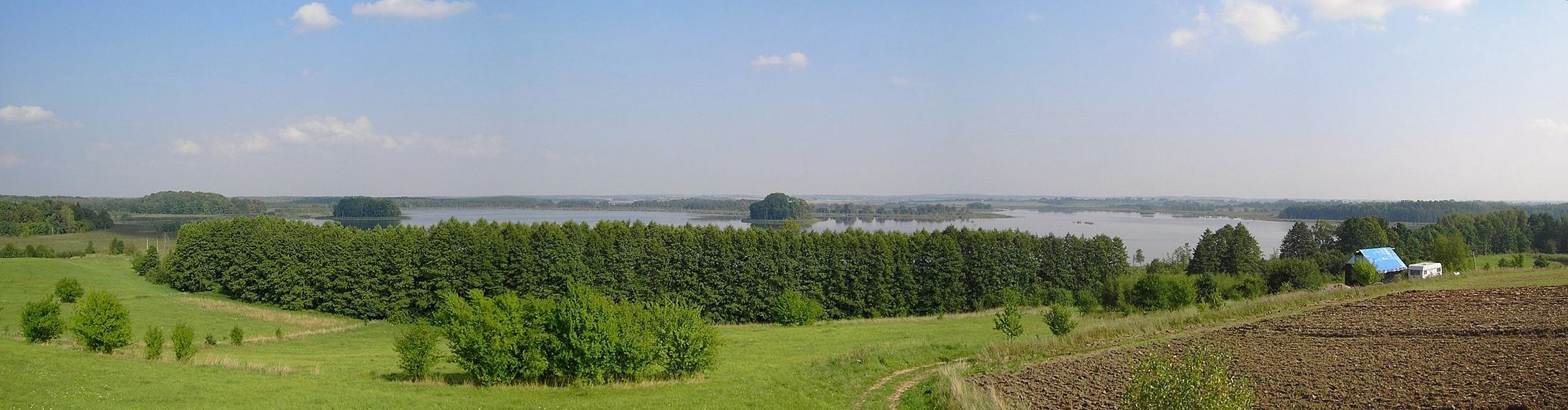 Rezerwat Oświn